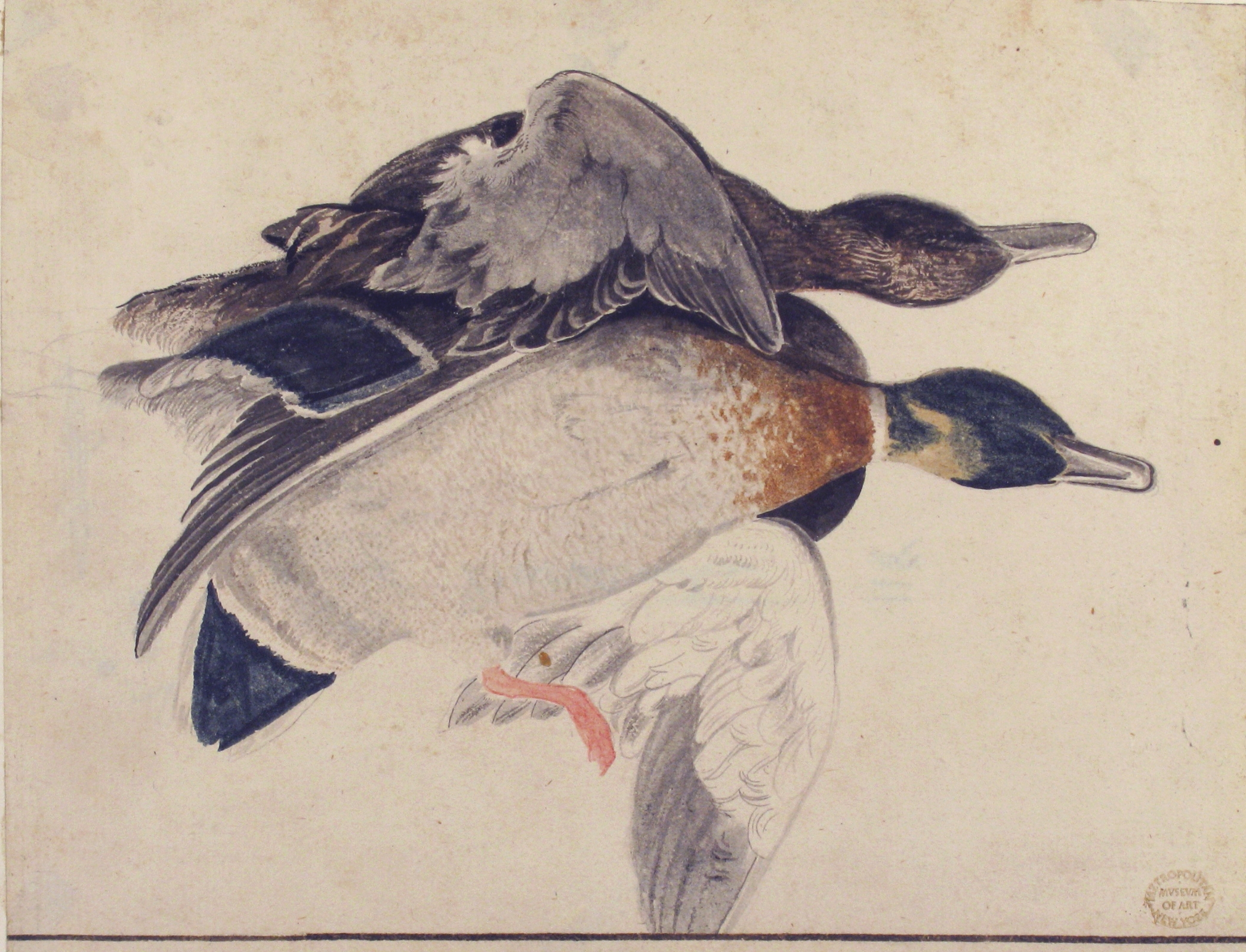 Drawing; Drawings